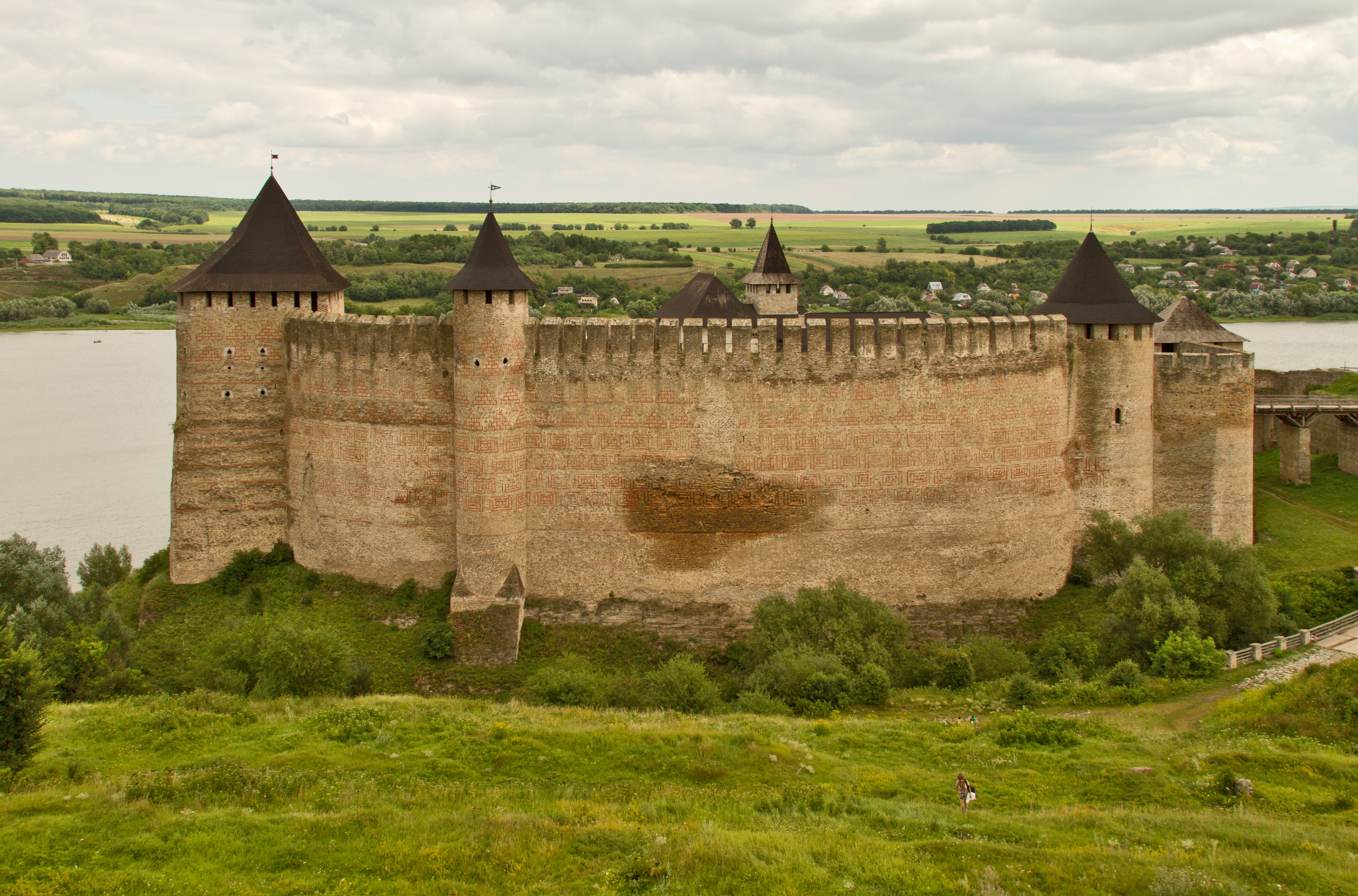 Комплекс споруд фортецi (мур.), Хотин